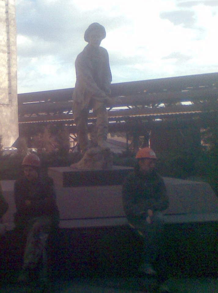 Пам'ятник М. К. Курако, співзасновнику Єнакіївського металургійного заводу